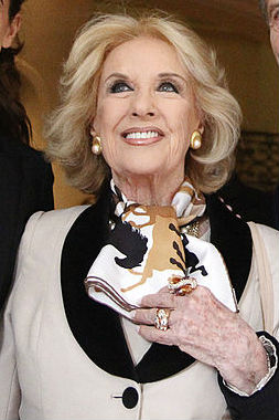 Mirtha Legrand en 2013, junto a Mauricio Macri y Juliana Awada